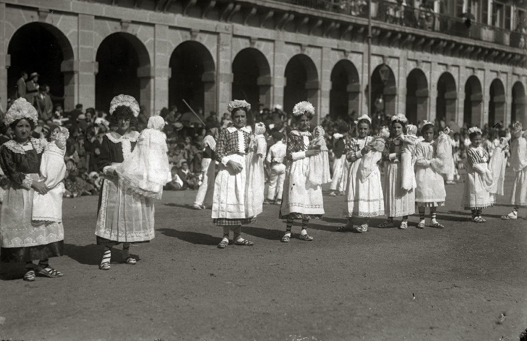 Título original: Grupo de 'Iñude eta Artzaiak' en la plaza de la Constitución durante la celebración de unas fiestas (3/3) Localización: San Sebastián (Guipúzcoa)